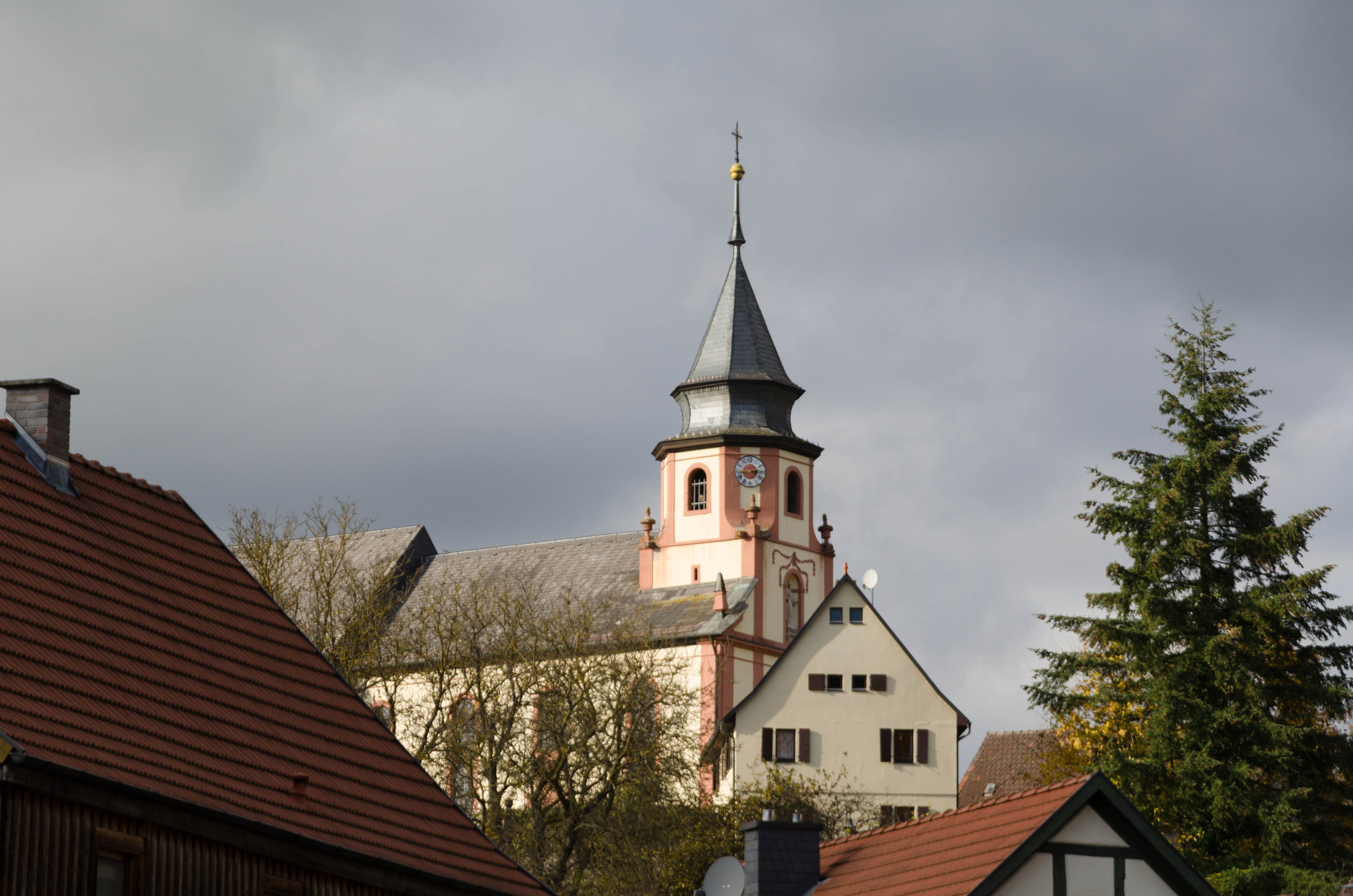 Burkardroth, Strahlsbach, St. Oswald